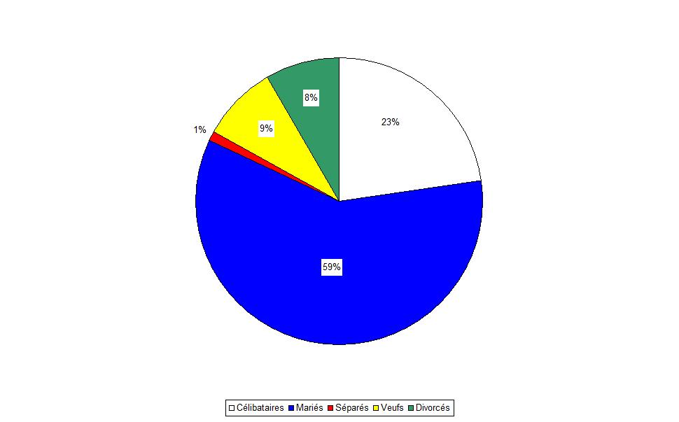 Situation familiale des habitants de plus de 15 ans de Delphos (Ohio - Etats-Unis) en 2009